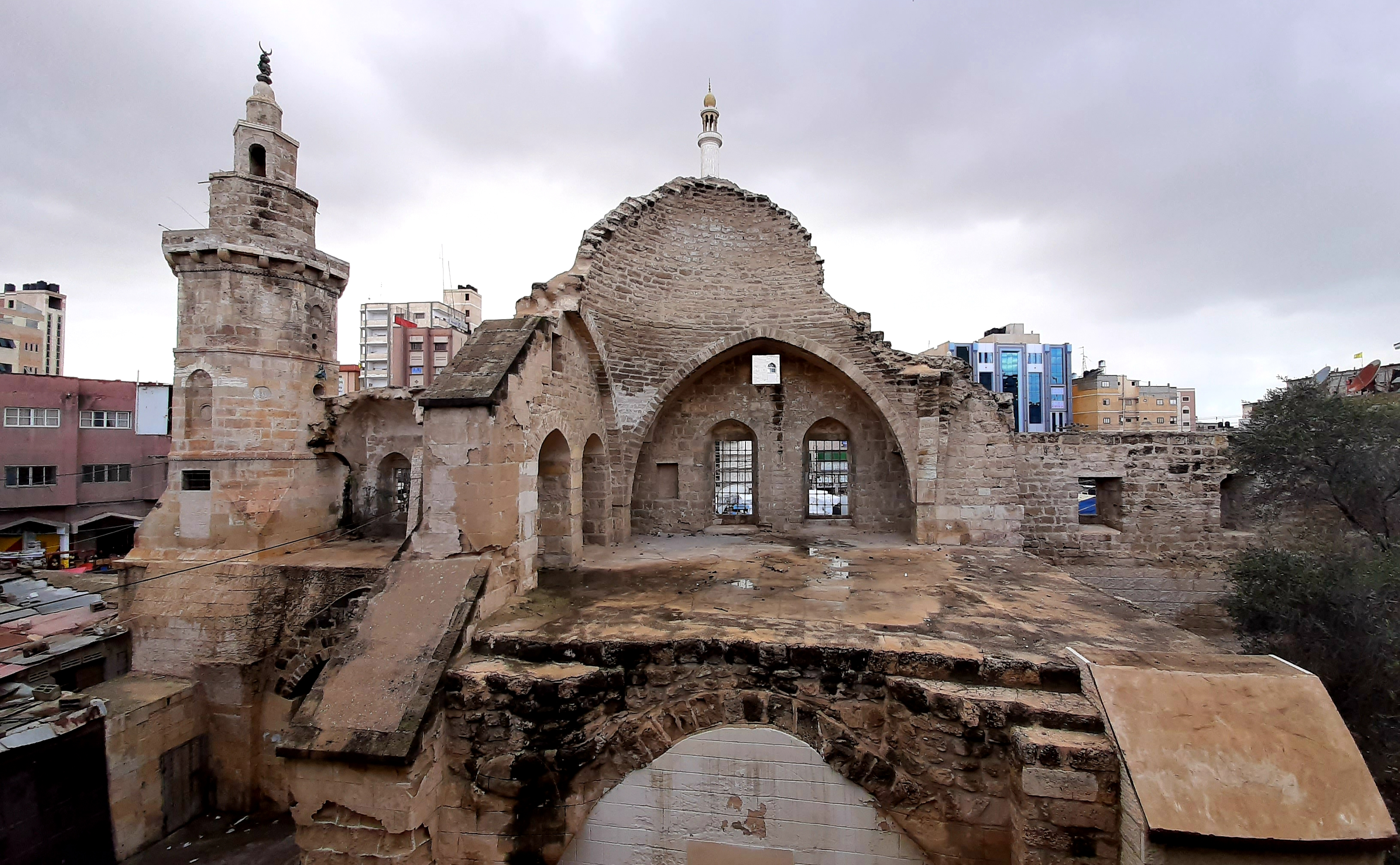 قلعة برقوق من الداخل في خانيونس جنوب قطاع غزة، بنيت عام 1387، بتكليف من السلطان برقوق، أحد سلاطين الحقبة المملوكية ومؤسس دولة المماليك البرجية، وأسند المهمة إلى الأمير يونس بن عبدالله النورزي الداودار، وسميت مدينة خان يونس على اسمه.